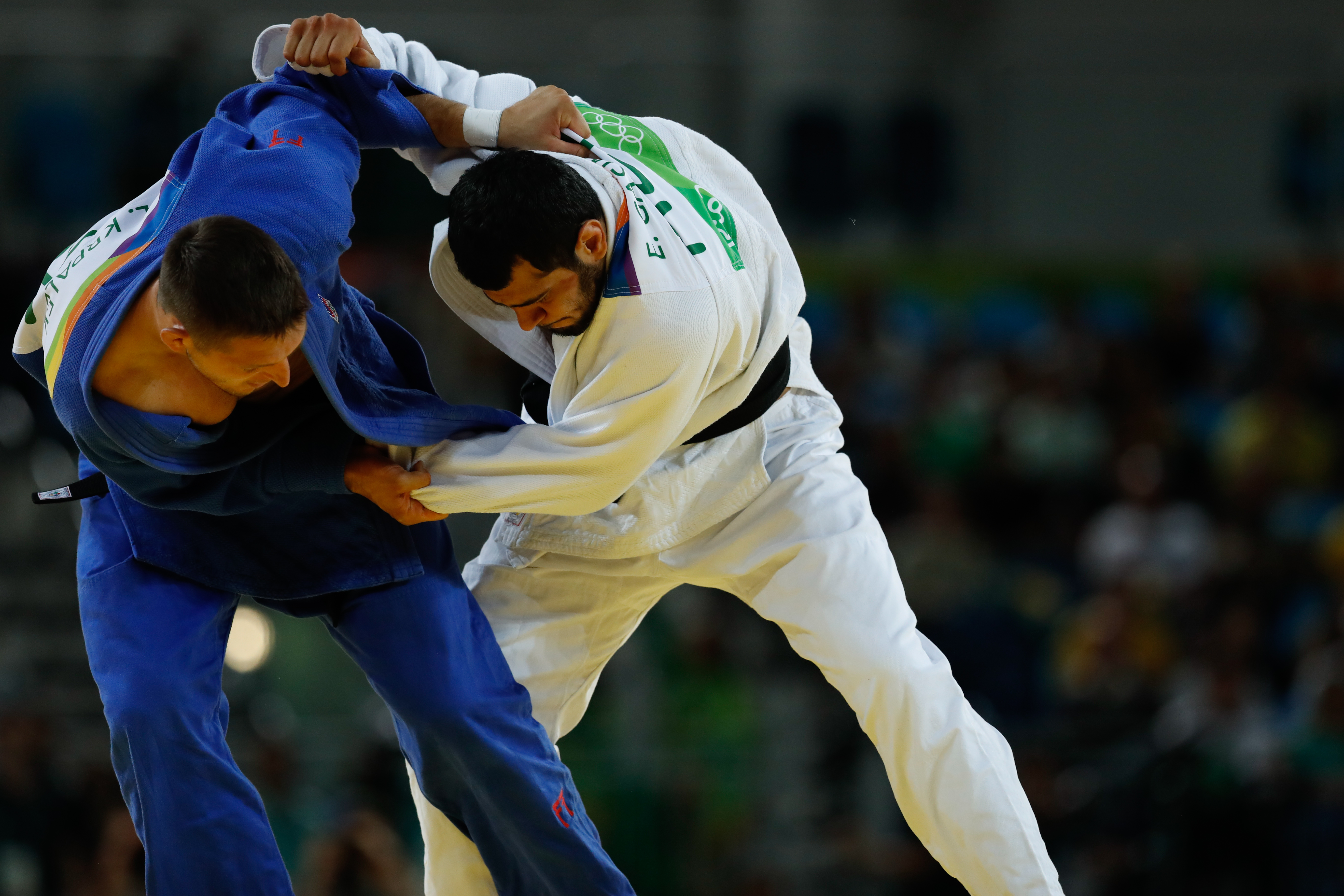 Rio de Janeiro - O judoca tcheco Lukas Krpalek vence o azerbaijano Elmar Gasimov na categoria até 100 quilos e ganha medalha de ouro na Rio 2016 (Fernando Frazão/Agência Brasil)